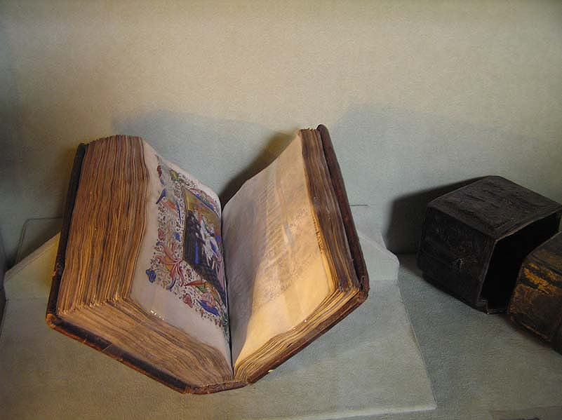 Livre d'heure hôtel de Cluny Paris musée national du Moyen age